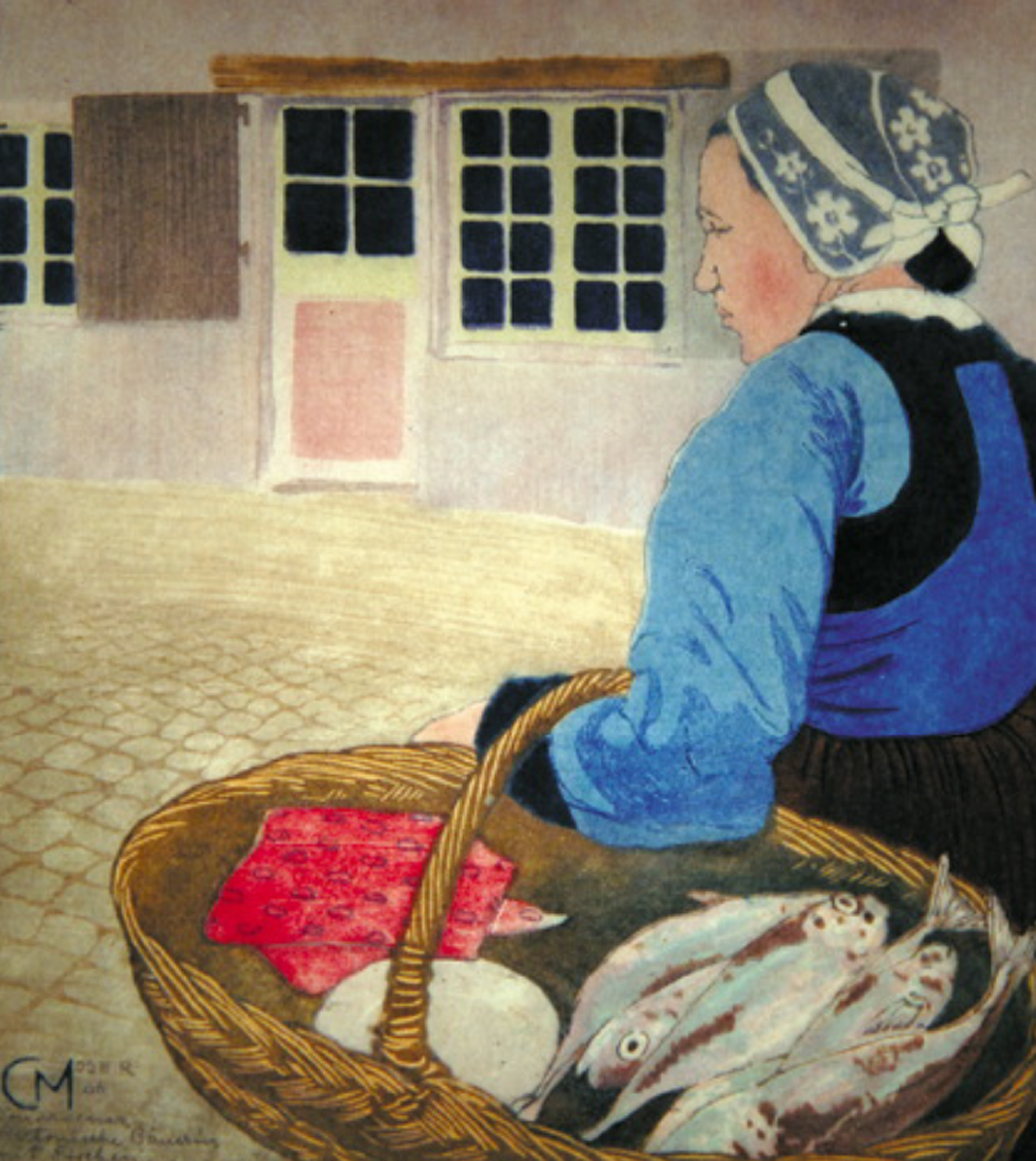 Bretonische Bäuerin mit Fischen